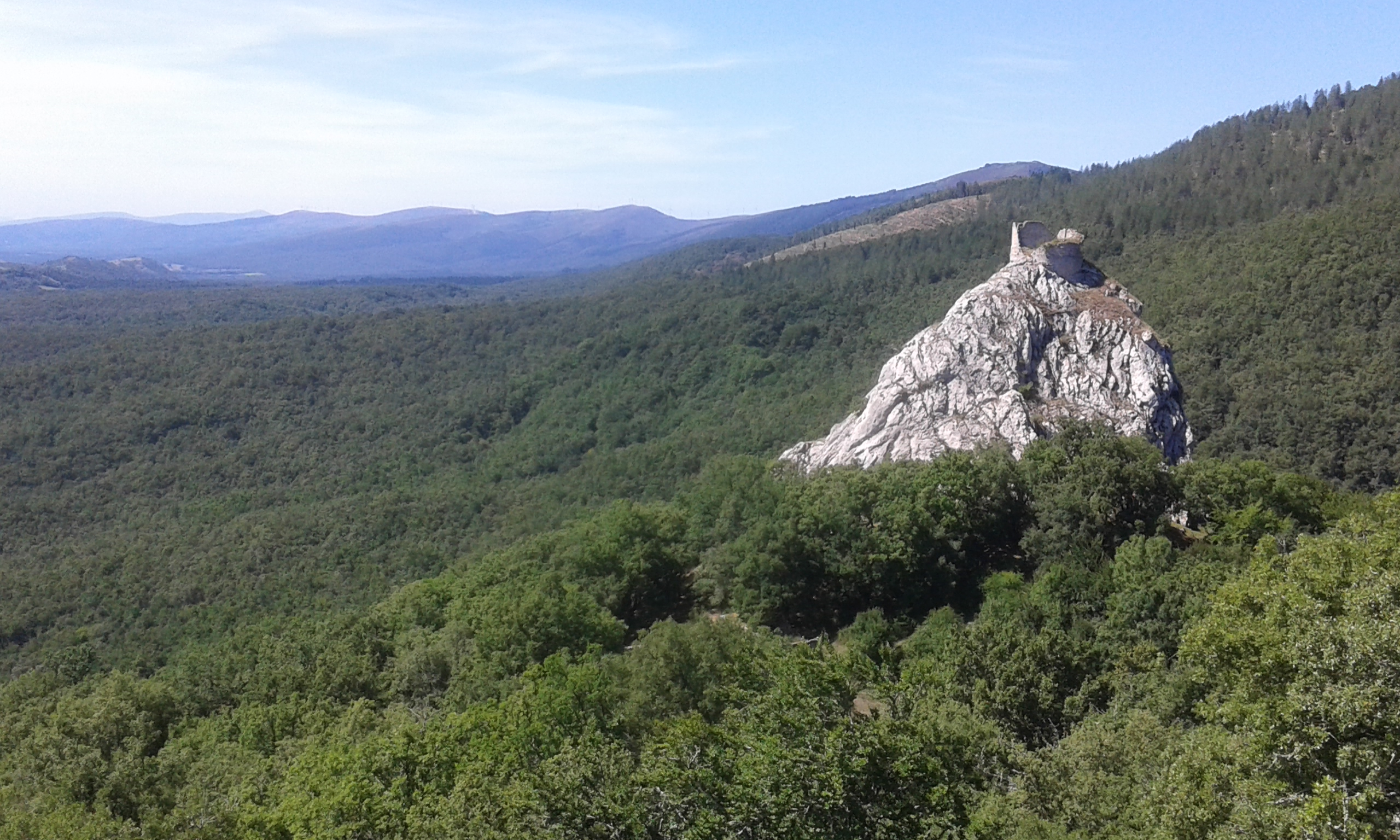 Vista del castillo de Marutegi desde la peña de San Miguel. AGOSTO 2019 (Araia, Araba/Álava, País Vasco)